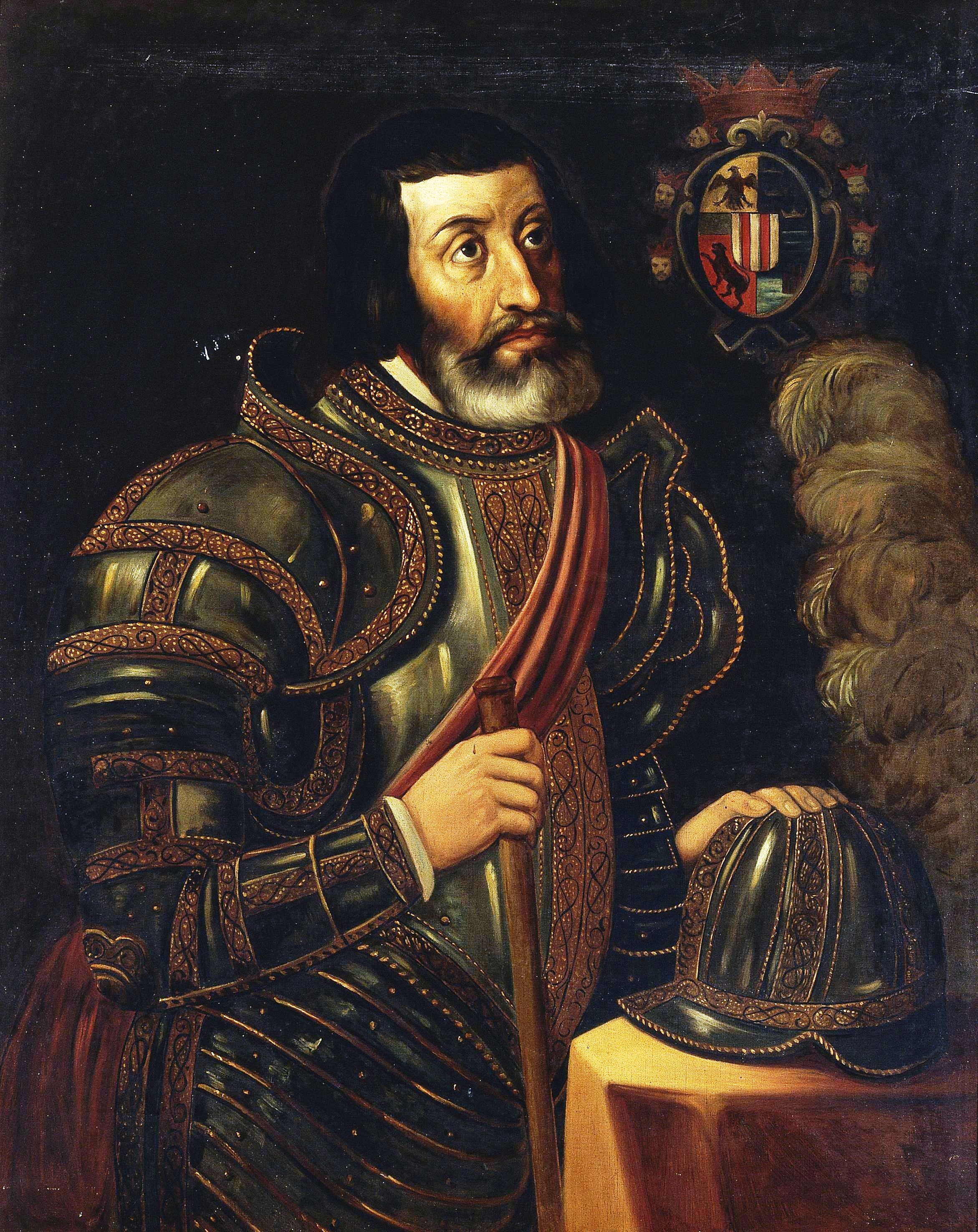 Retrato del célebre conquistador español Hernán Cortés. Esta obra es una copia decimonónica del retrato de dicho personaje conservado actualmente en la sala de Cabildos del Ayuntamiento de la Ciudad de México D.F..